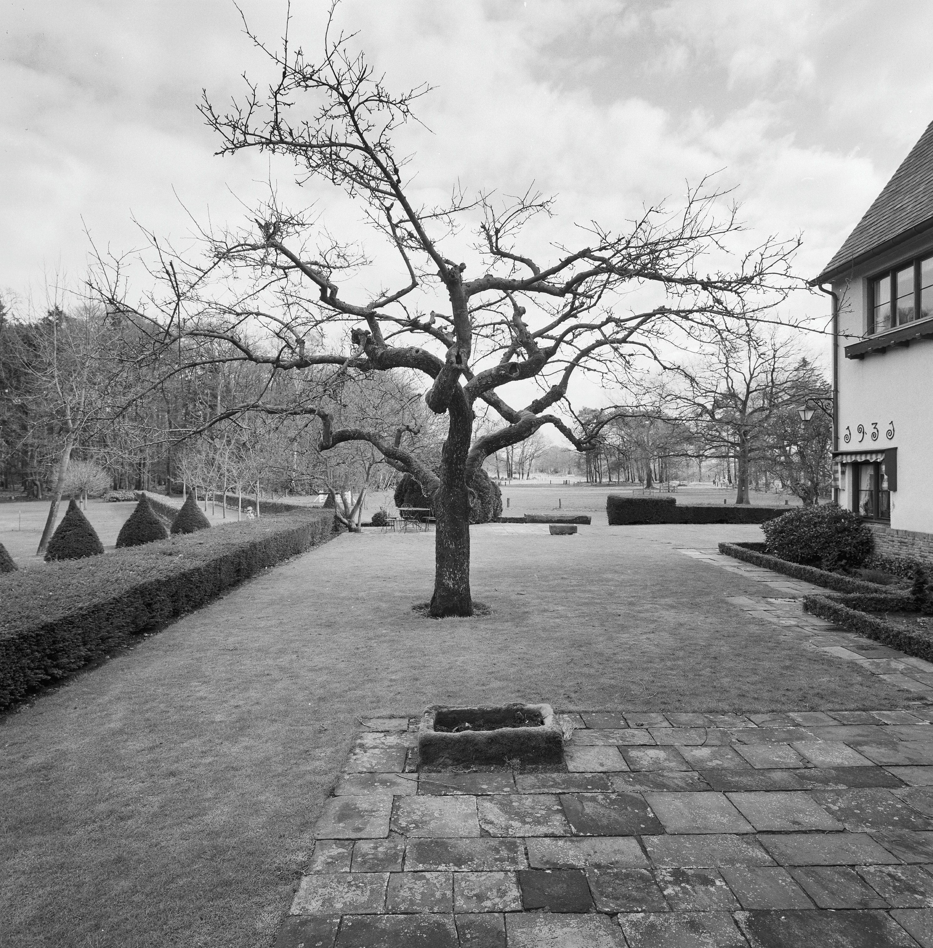 De Eekhof: Overzicht tuin met rechts het woonhuis, gezien vanaf het terras